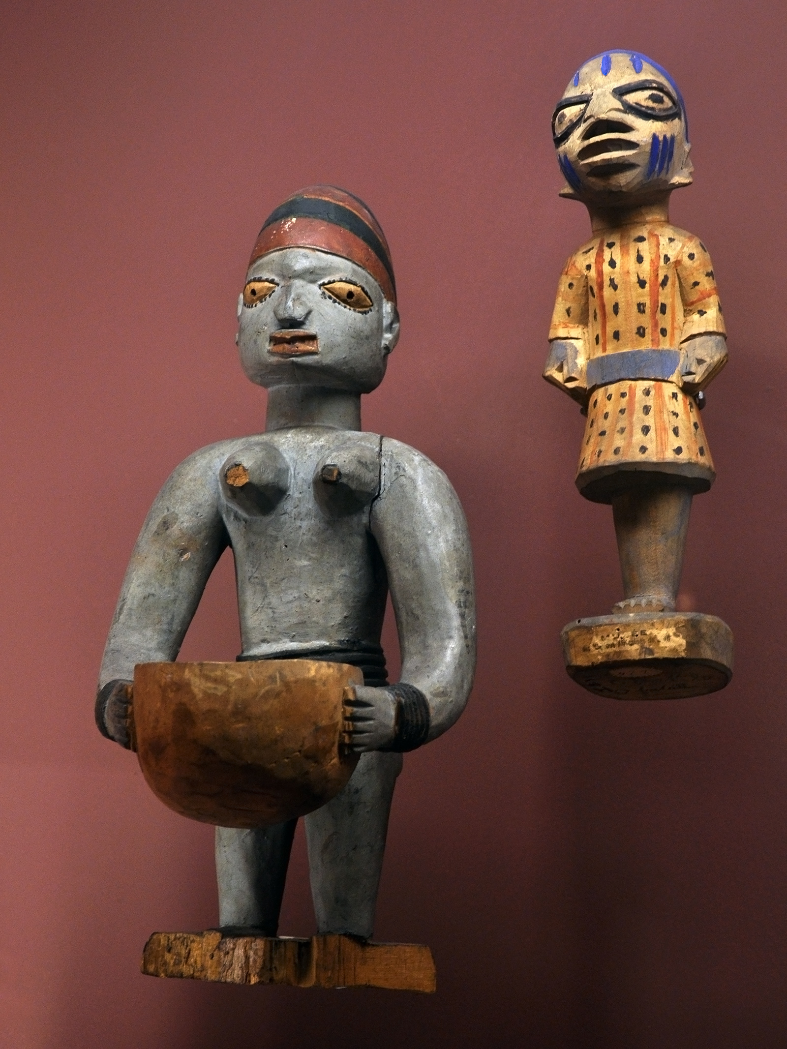 Statuette représentant deux Orishas ( divinité ), culture Yoruba, fin du 19ème siècle. Provient d'Abeokuta au Nigéria. Musée africain à Lyon.